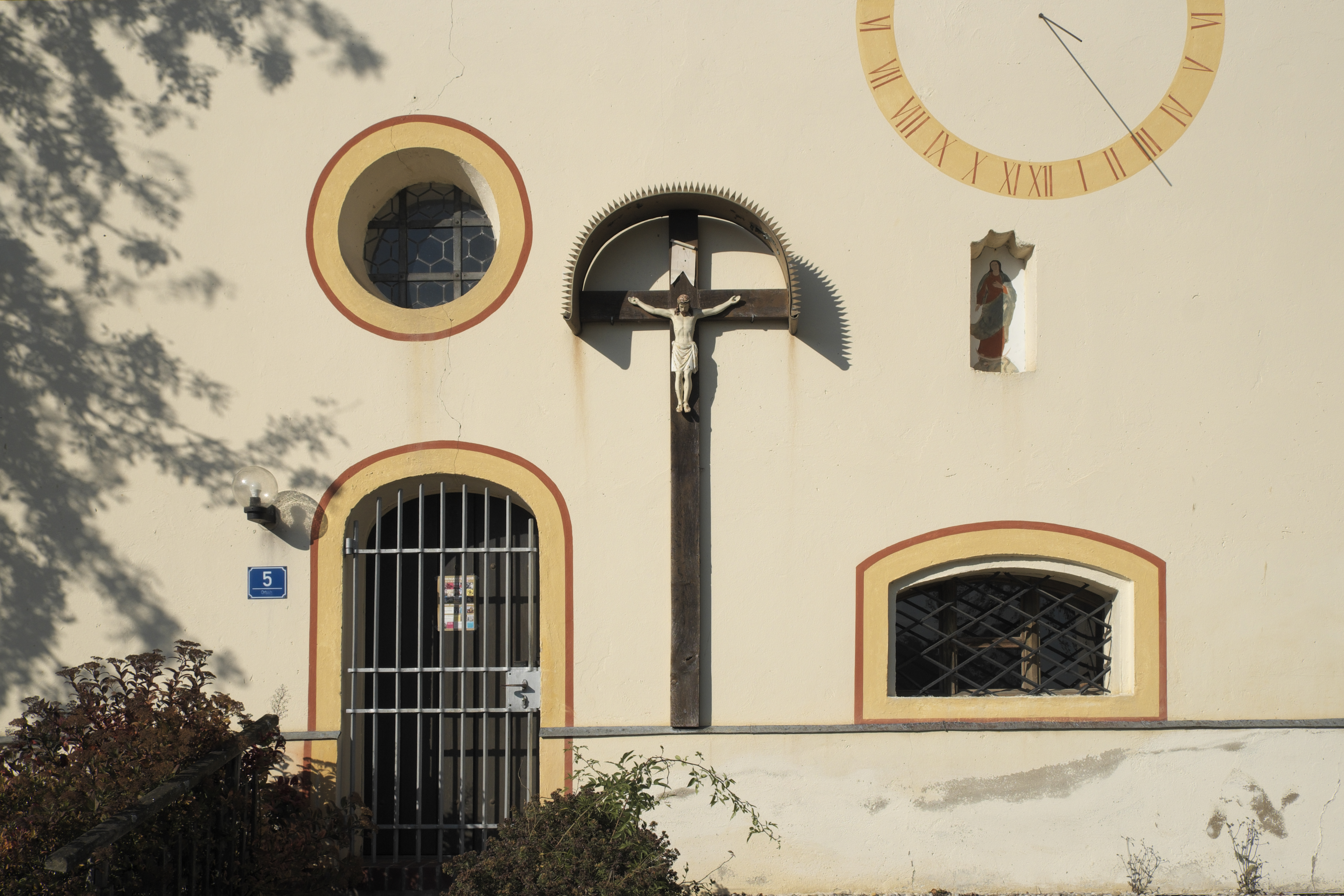 Katholische Filialkirche Unsere Liebe Frau in Machtenstein (Schwabhausen) im Landkreis Dachau (Bayern/Deutschland), Südseite des Langhauses mit Kruzifix und Sonnenuhr